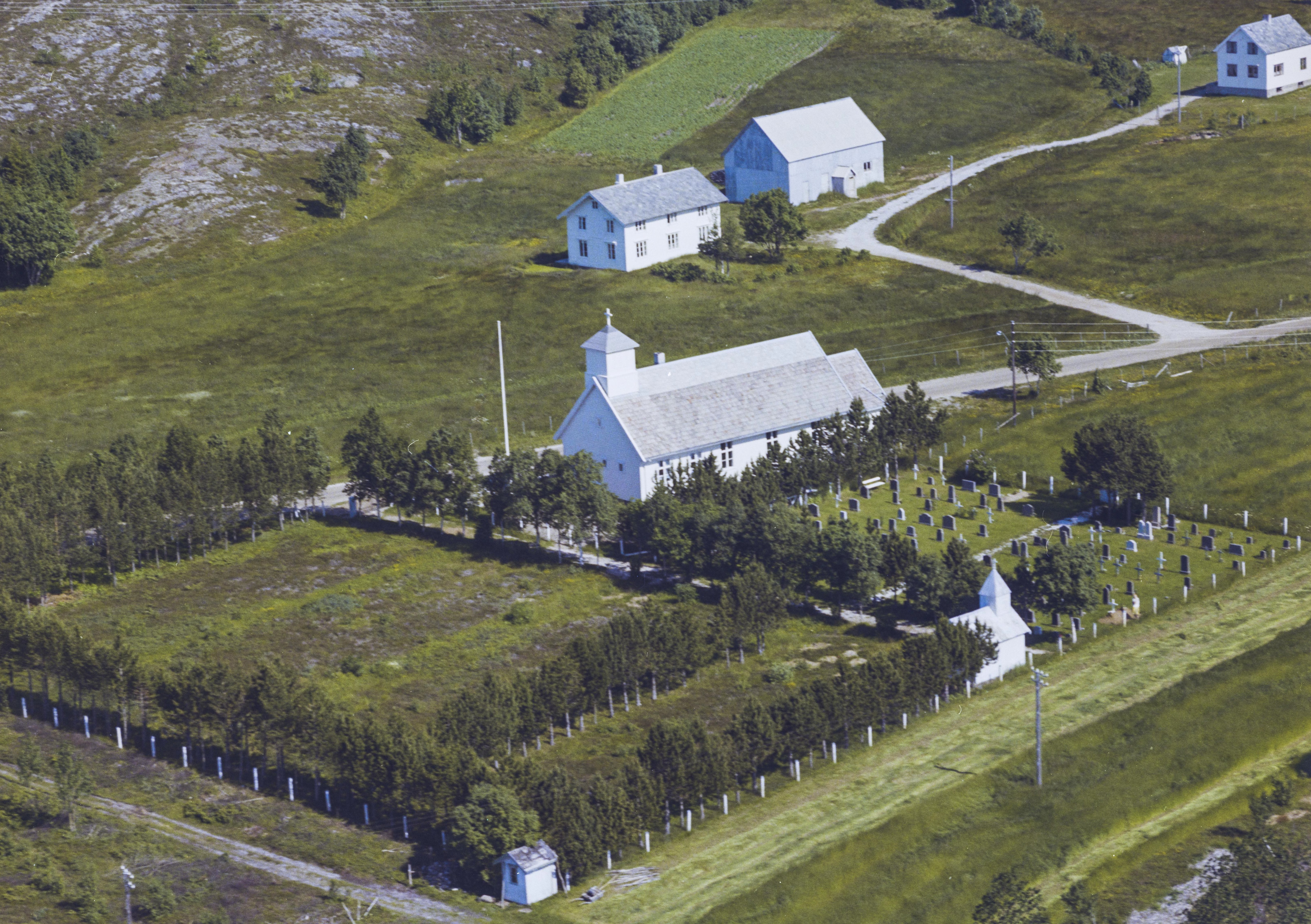 Leinesfjord bedehuskapell i Steigen. Foto: Widerøes Flyveselskap. Fra Nasjonalbibliotekets samling.